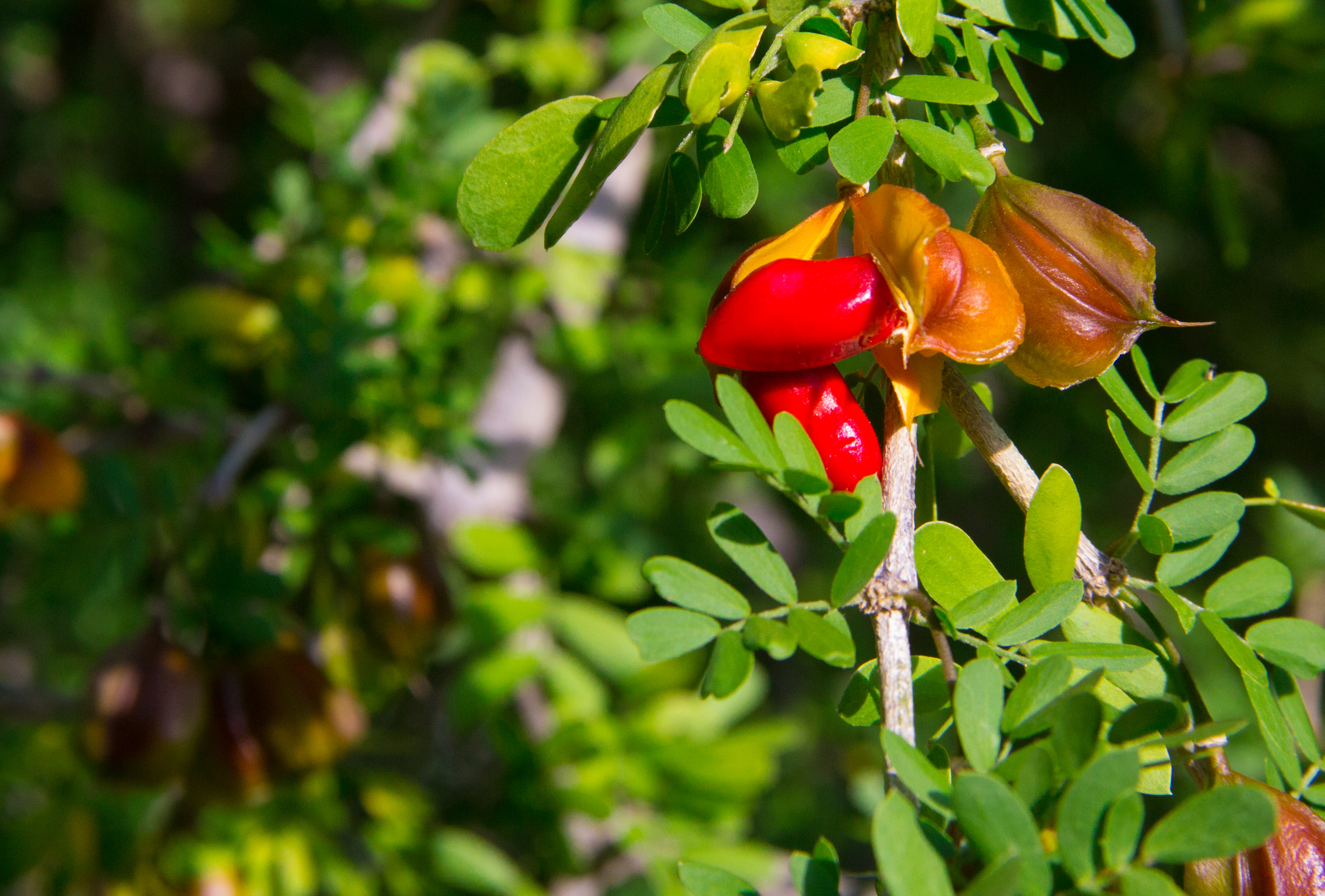 Semillas de Guaiacum coulteri. En realidad es el fruto, ya que la semilla es negra.